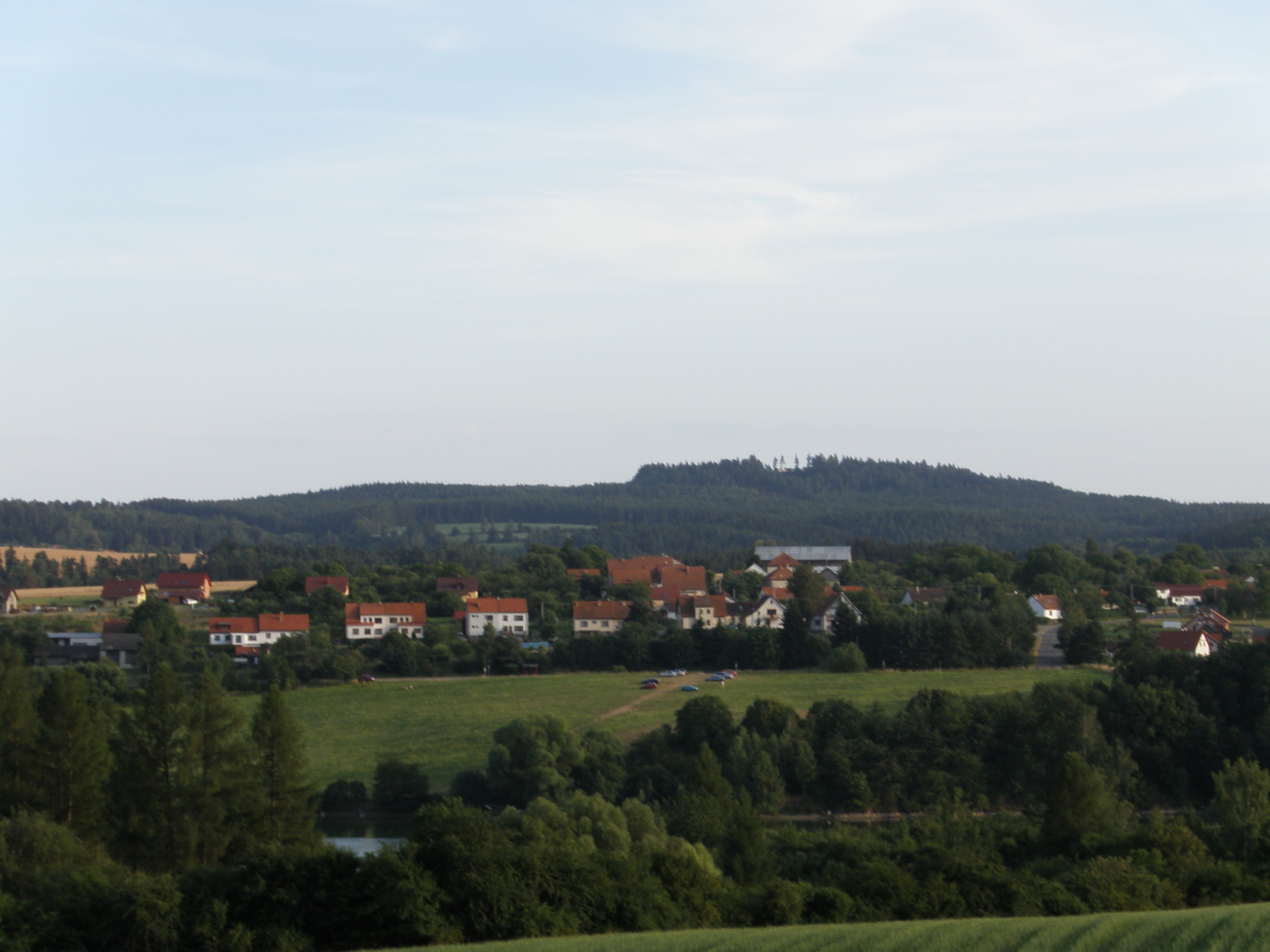 Obec Vranová v okrese Blansko